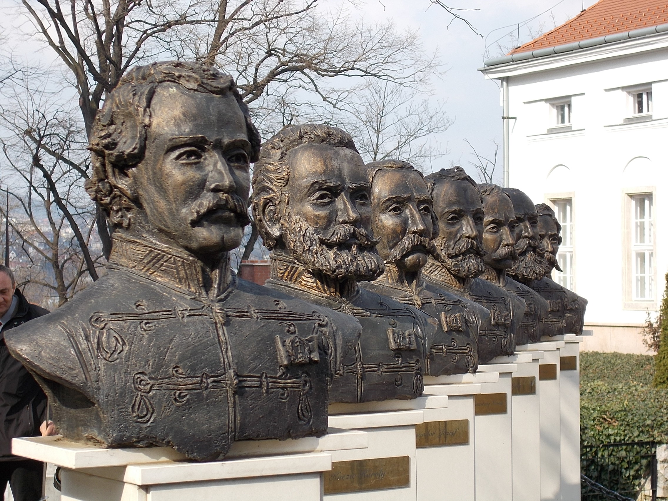 A tízenhárom aradi vértanú mellszobor (jobb csoport) az udvaron. Hadtörténeti Múzeum. - Tóth Árpád sétány 40. Budai Várnegyed, Budapest